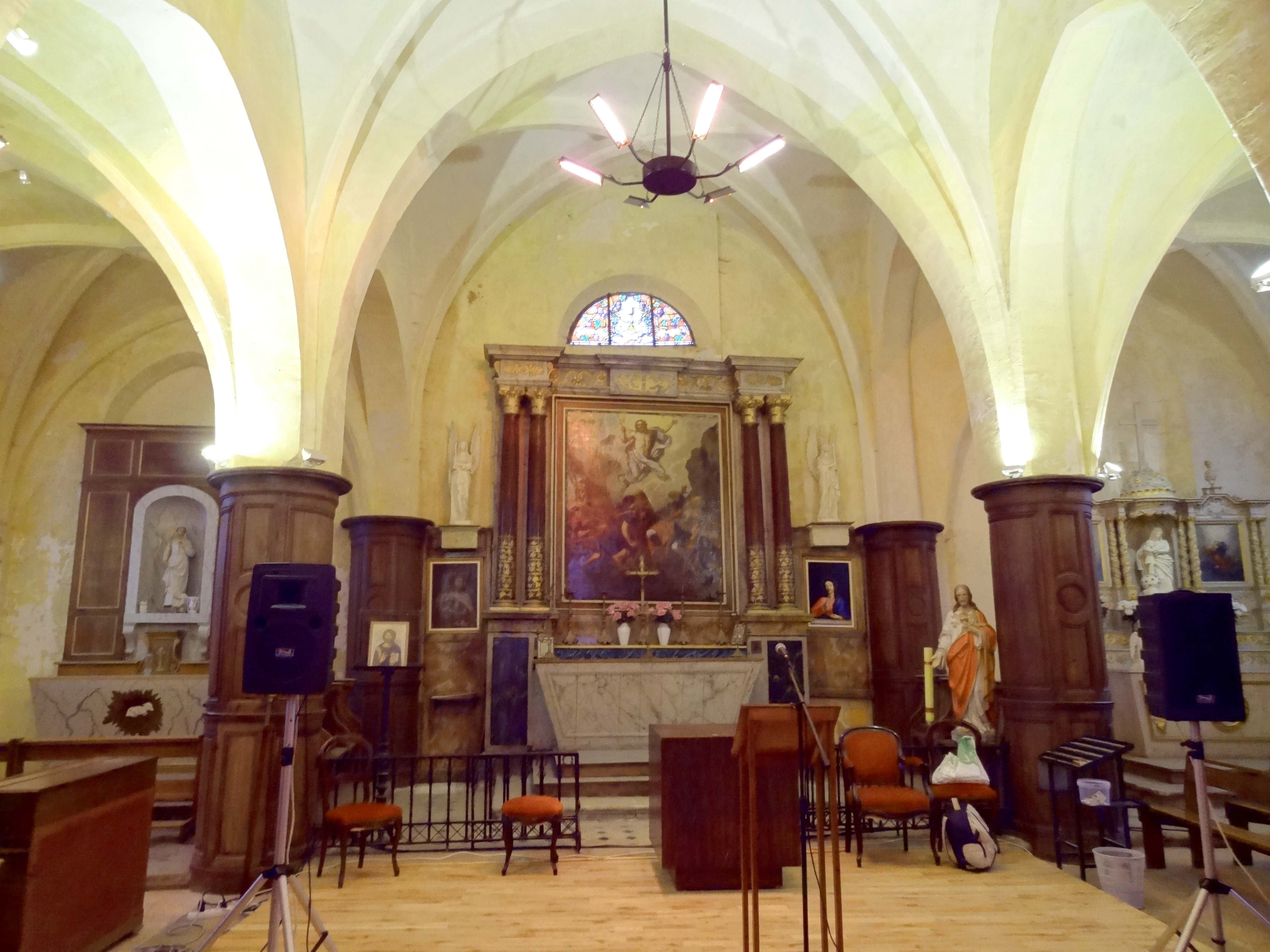 Intérieur de l'église - voir titre.